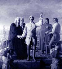 Der Major Davel vor seiner Hinrichtung, historisches Gemälde von Charles Gleyre 1850, Lausanne, Musée cantonal des Beaux-Arts